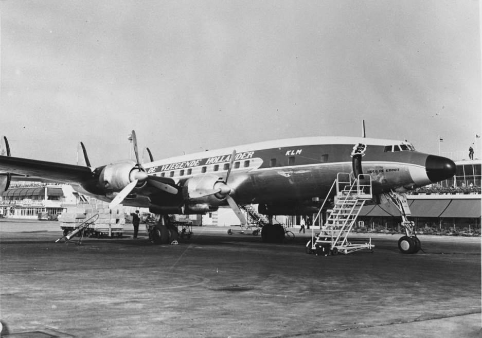 Vermiste KLM super constellation Hugo de Groot